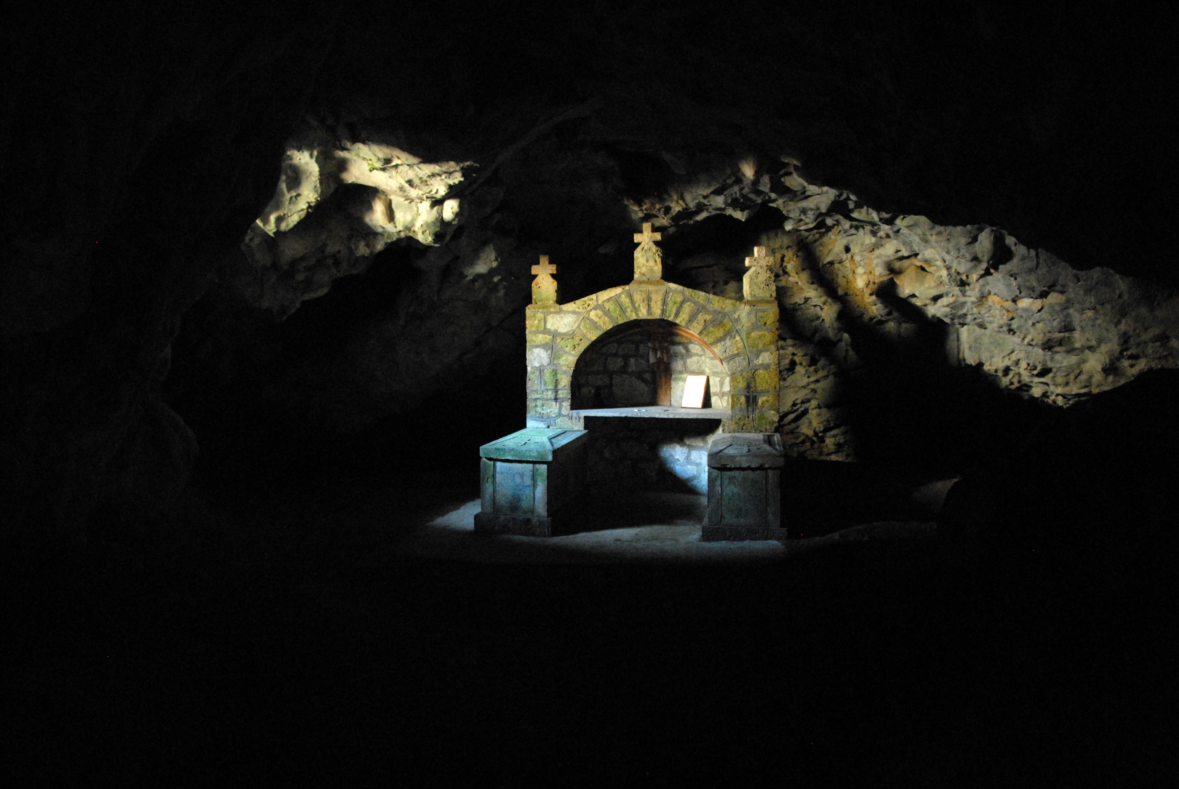 Pećina -kapela u Ovčarsko-Kablarskoj klisuri, pripada manastiru Blagoveštenje.Pećina Kađenica je dobila ime po jednom nemilom događaju u vreme Hadži-Prodanove bune. Naime, narod je izbegao u ovu pećinu, ali su je Turci pronašli, na ulaz natrpali slame i granja i zapalili, tako da se narod u pećini ugušio. Godine 1936 kosti su sakupljene i sahranjene u istoj pećini, u dva kamena sarkofaga u oltarskoj apsidi, u kojoj je izrađeno Hristovo raspeće